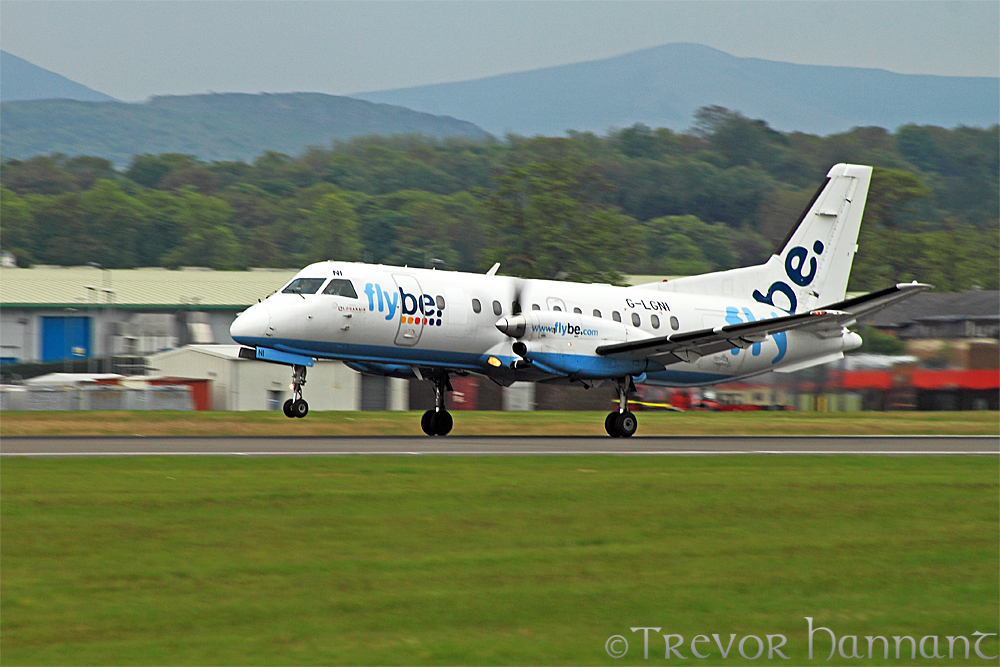 FlyBe Saab 340 G-LGNI